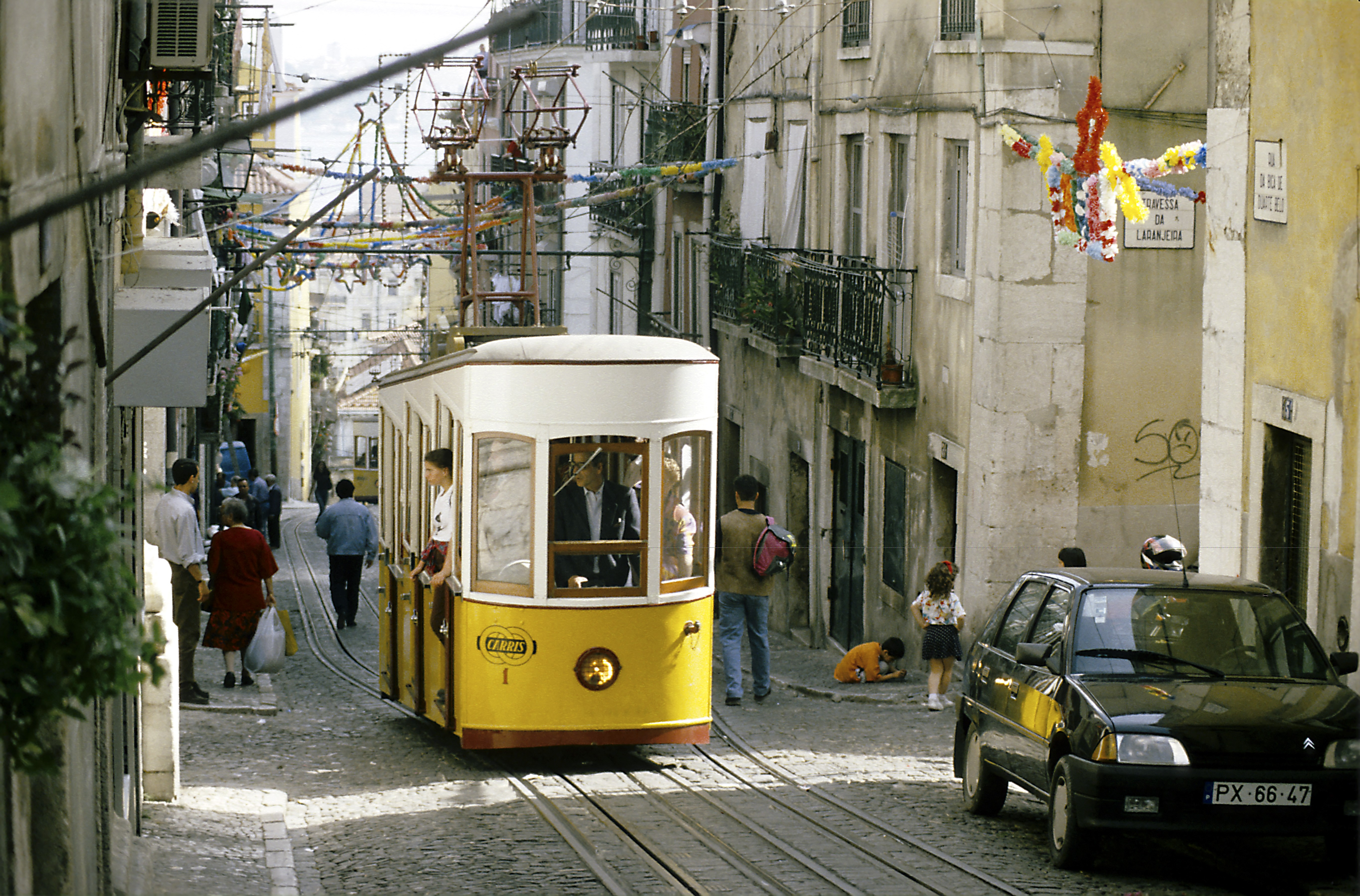 Wagen 1 bei der Bergfahrt am oberen Ende der Kreuzungsstelle, die Rua da Bica de Duarte Belo ist abgesehen von der Standseilbahn eine gewöhnliche und belebte Altstadtgasse.